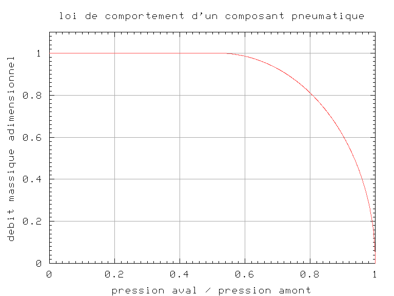 Représentation normalisée de la loi de comportement d'un composant pneumatique